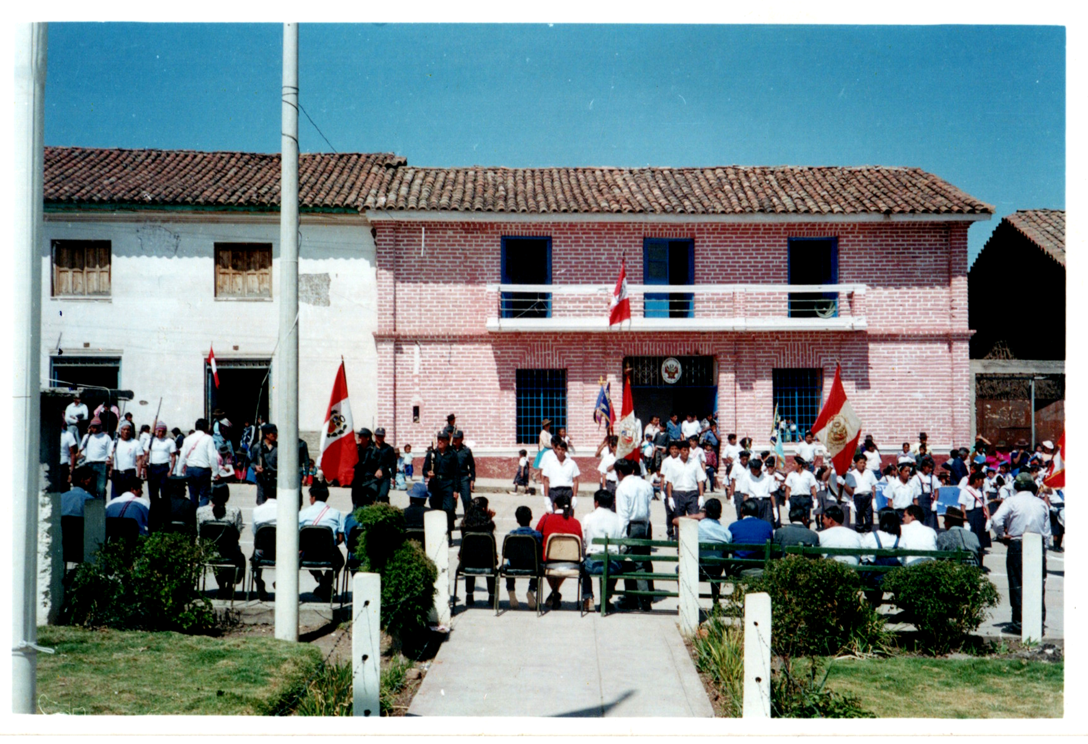 Palacio municipal, hoy tiene nueva infraestructura